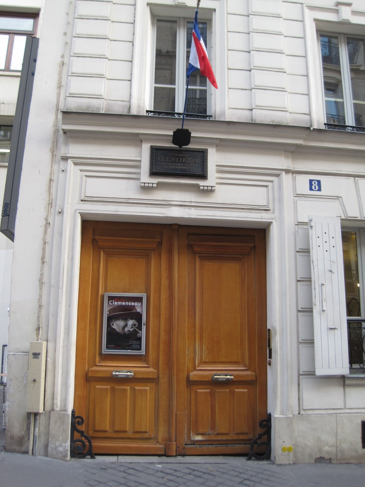 Musée Clemenceau Paris